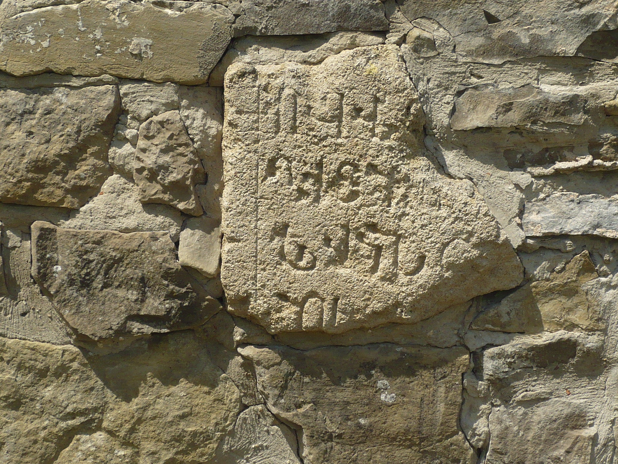 Tablica na murze wokół kościoła ormiańskiego pw. Niepokalanego poczęcia NMP